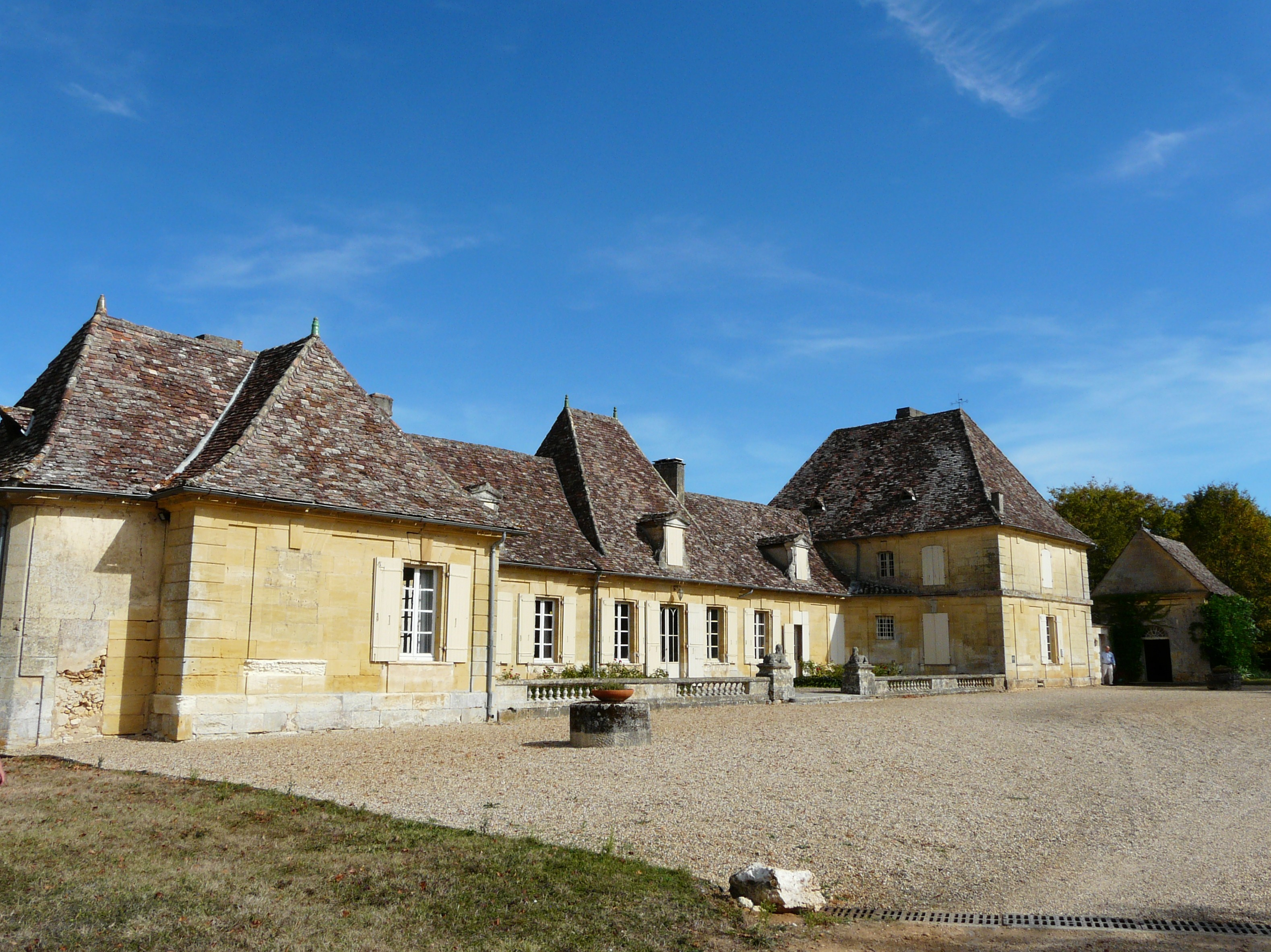 Le château de Montbrun, Verdon, Dordogne, France.